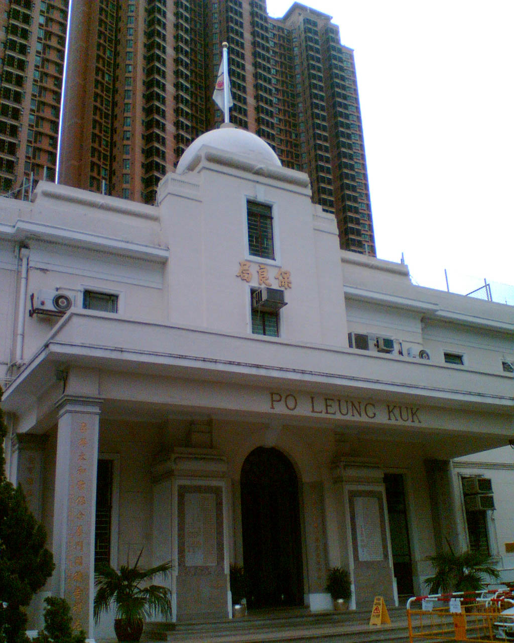 保良局